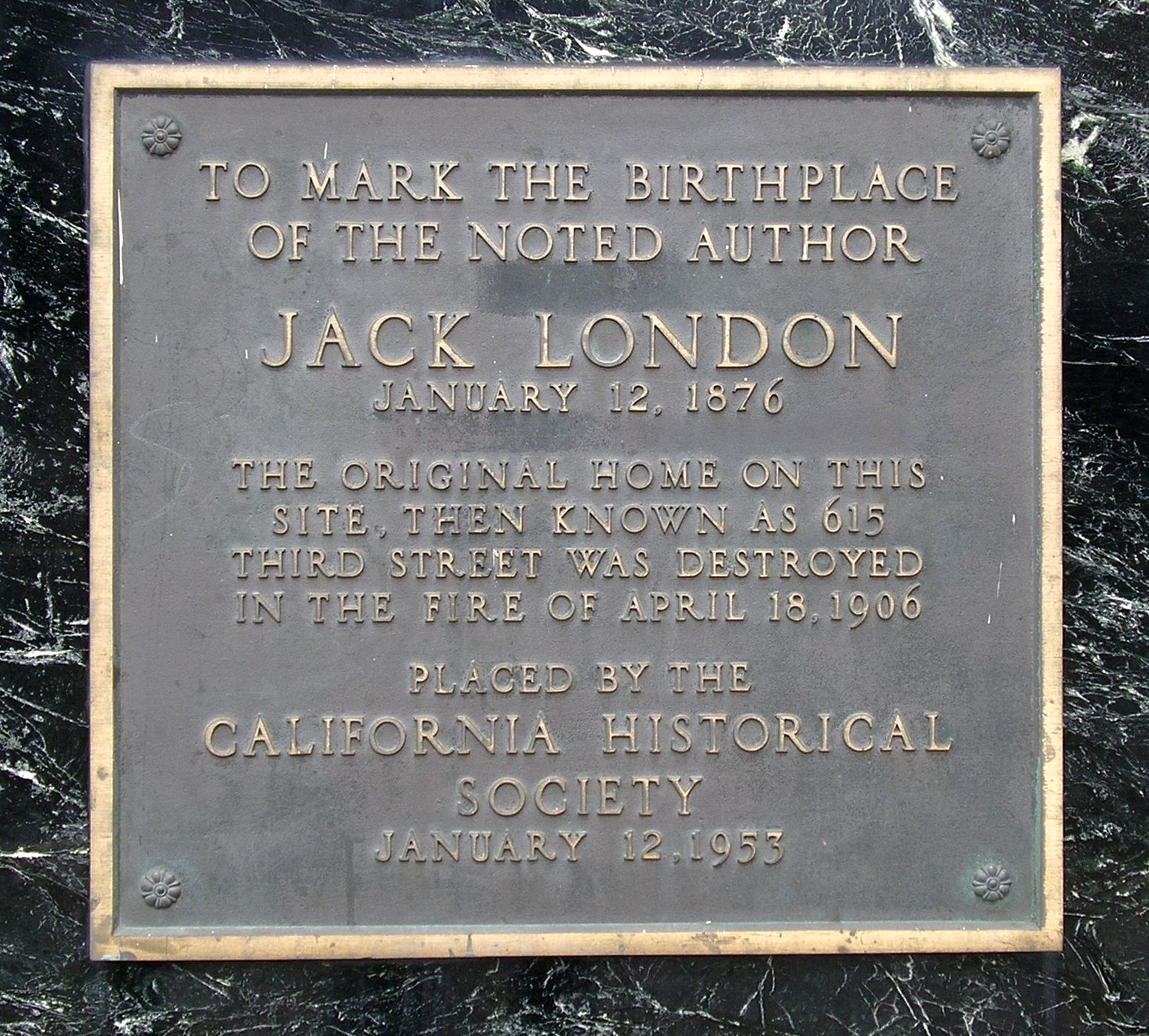 Gedanktafel an der Stelle des Hauses, in dem Jack London geboren wurde